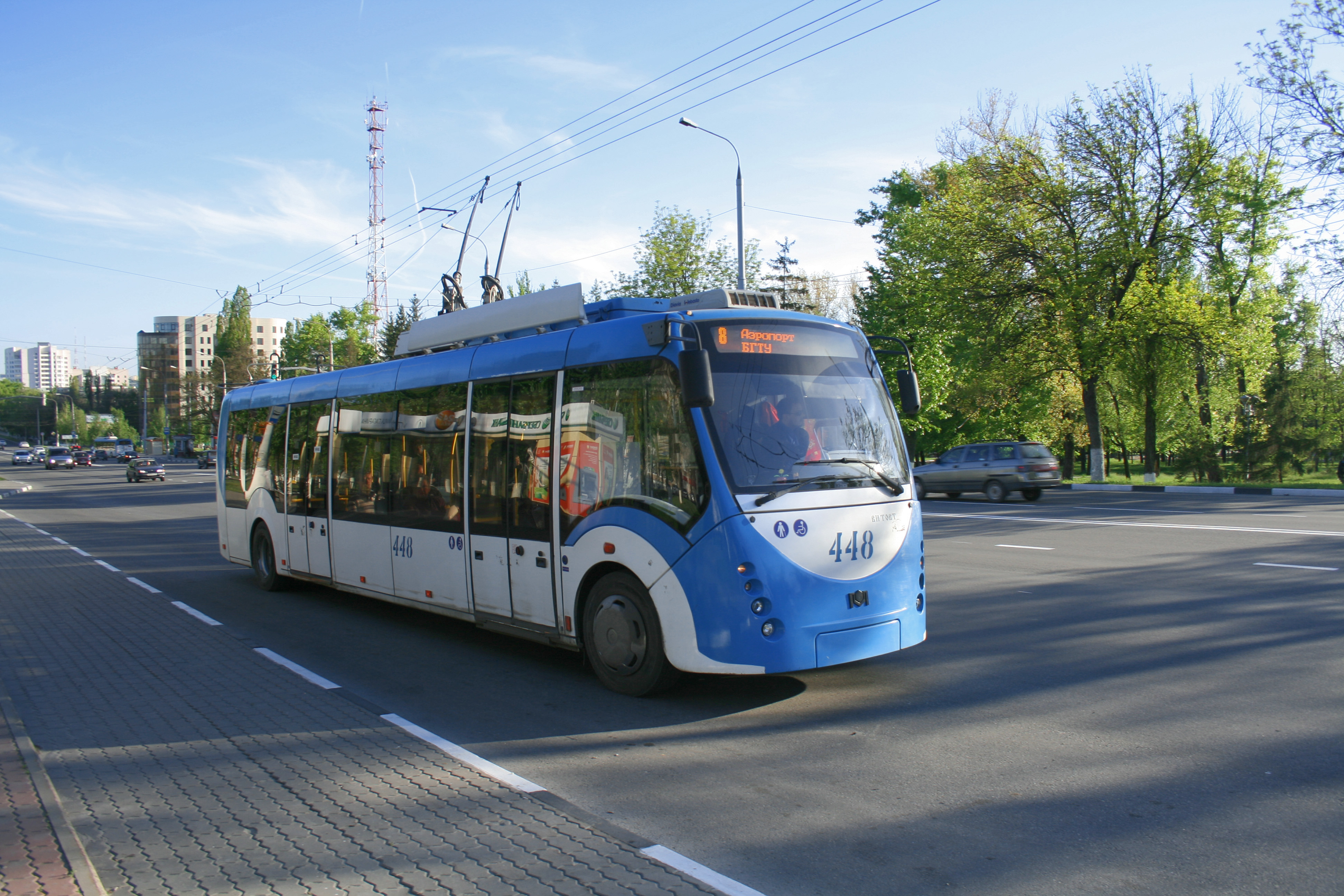 Белгородский троллейбус на проспекте Б. Хмельницкого